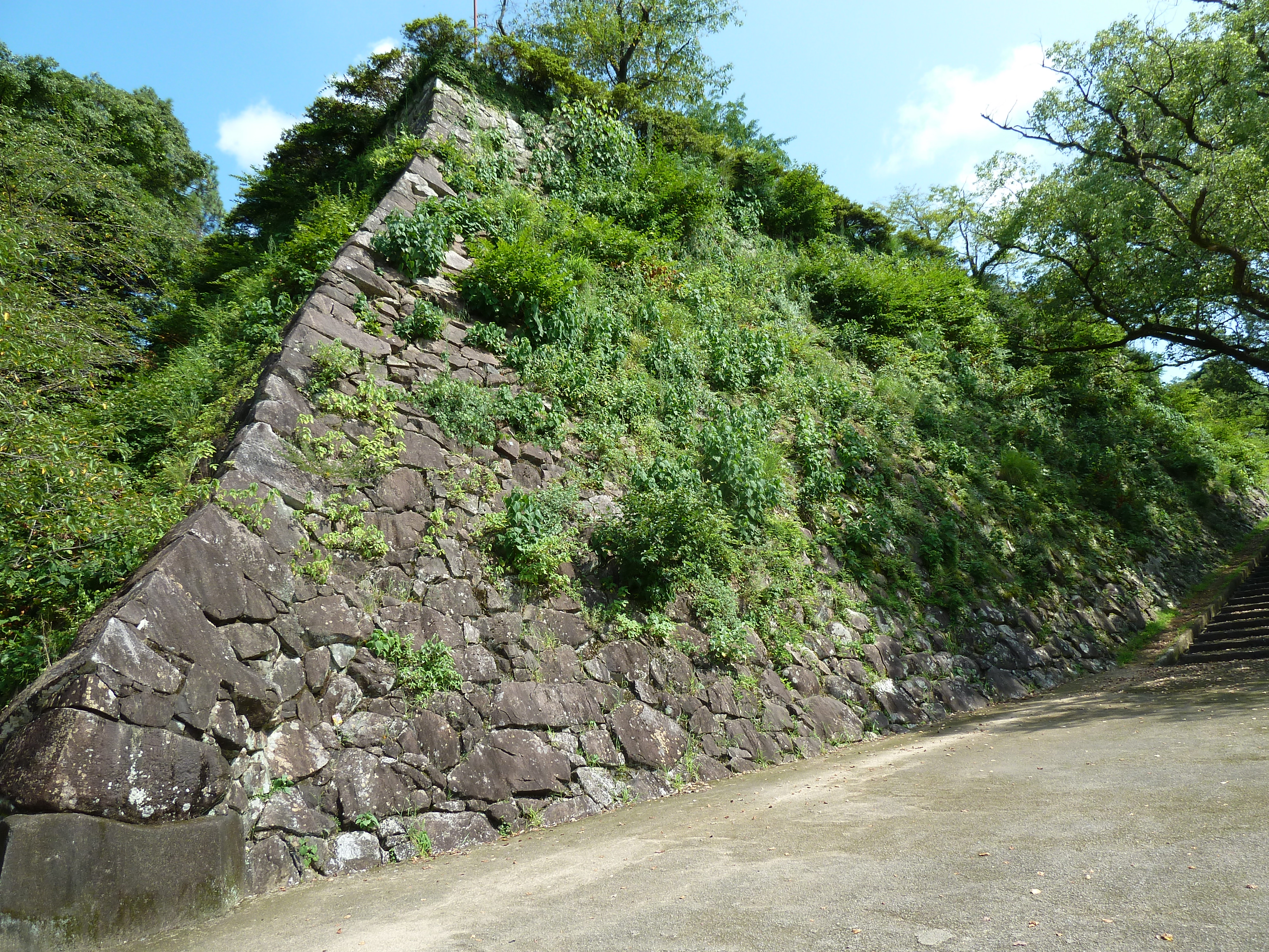 千人殺しの石垣